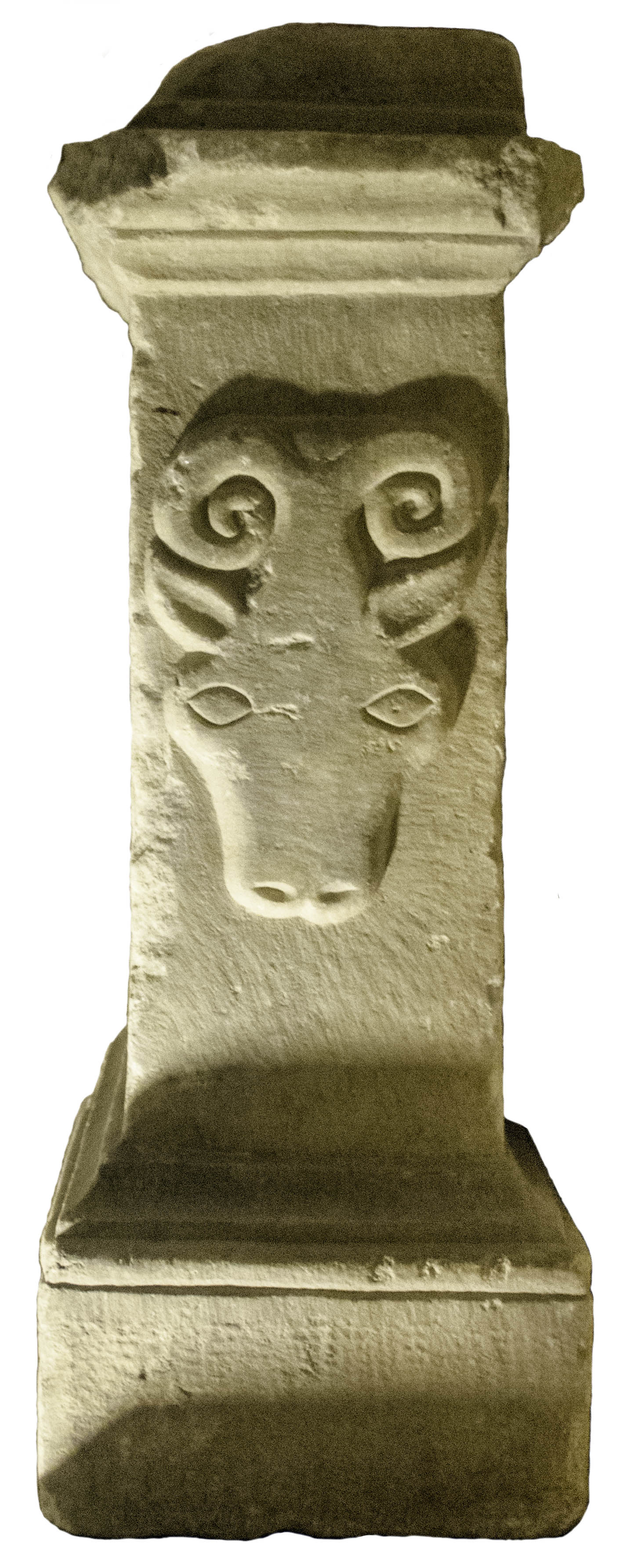 Autel taurobolique d’Antonia Prima, face latérale droite : tête de bélier. Musée Eugène-Camoreyt de Lectoure, Gers, France.